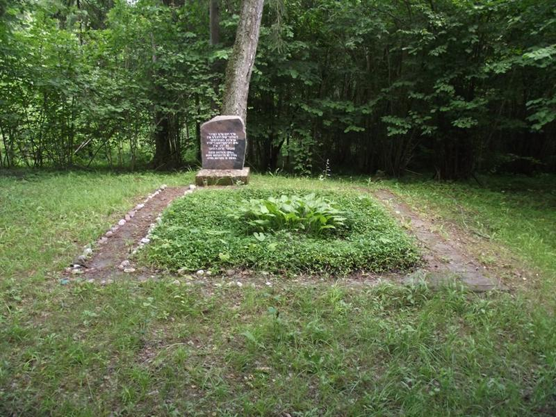 Subačiaus žydų žudynių vieta ir kapas